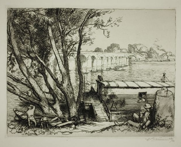 L'ancien pont de Poissy vue depuis la berge de Poissy côté amont. Au premier plan un homme fumant assis au sol, un autre est près de son canot. Sur la Seine une multitude de canot. Au fond une barge passe sous l'arche marinière.